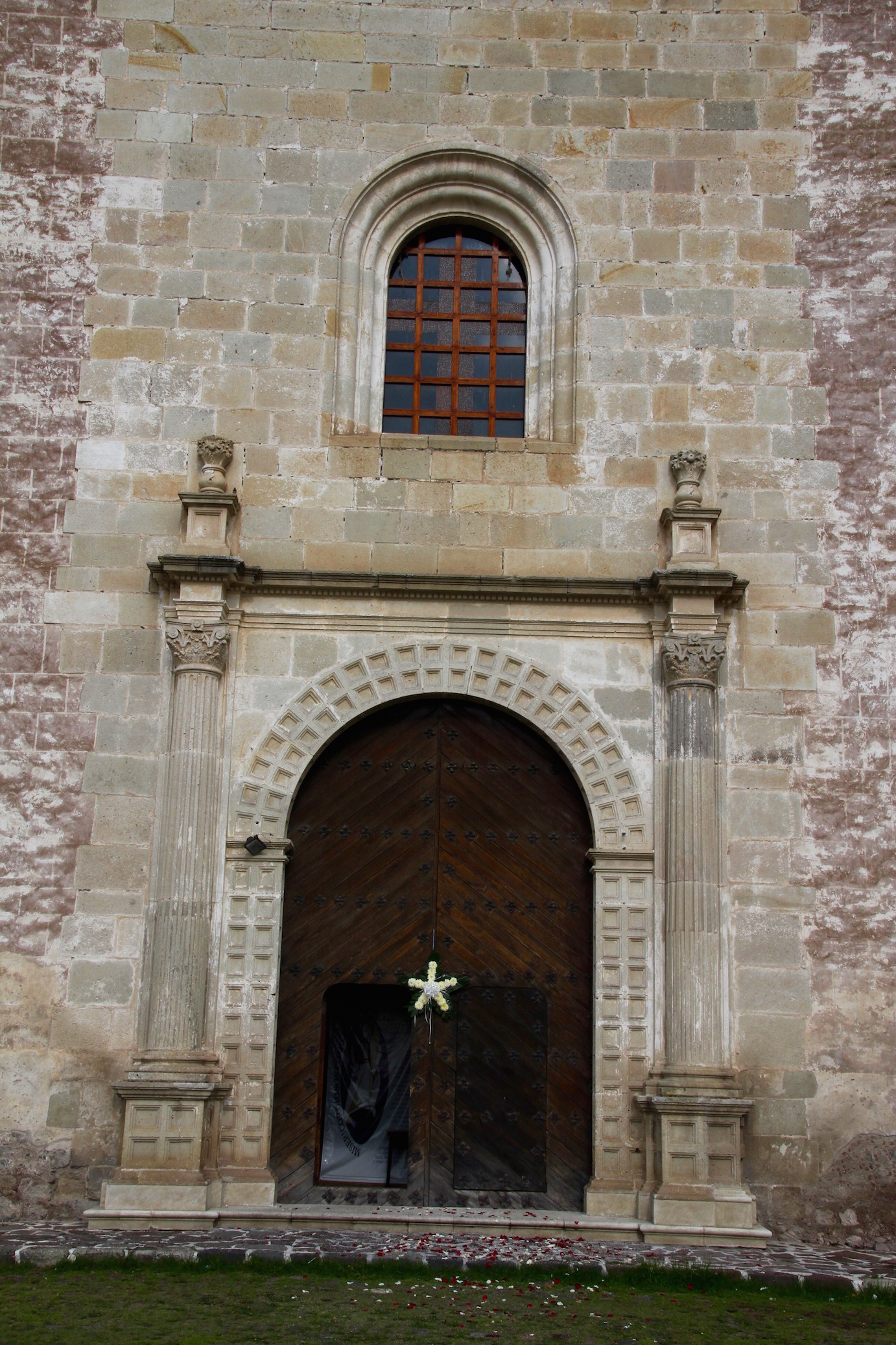 Detalle de la fachada de estilo plateresco de la Parroquia de Todos Santos, Zempola S.XVI